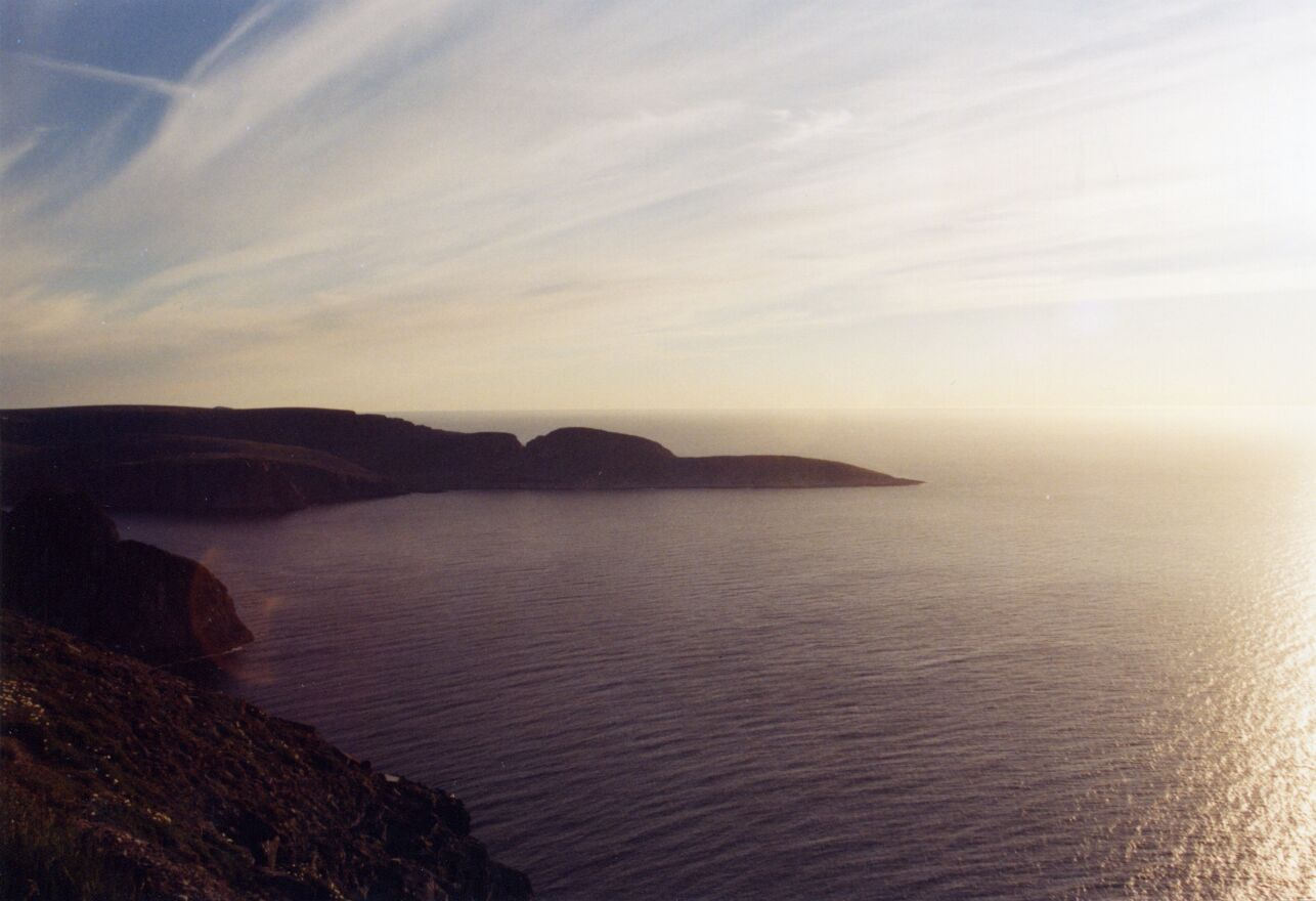 Knivskjellodden